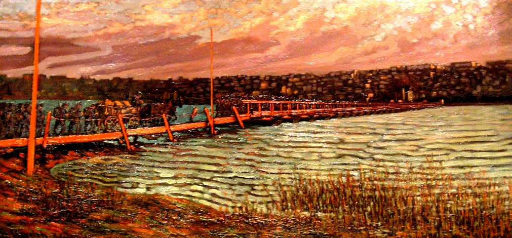 Die Kriegsbrücke bei Belgrad, Ölgemälde im Heeresgeschichtlichen Museum in Wien.